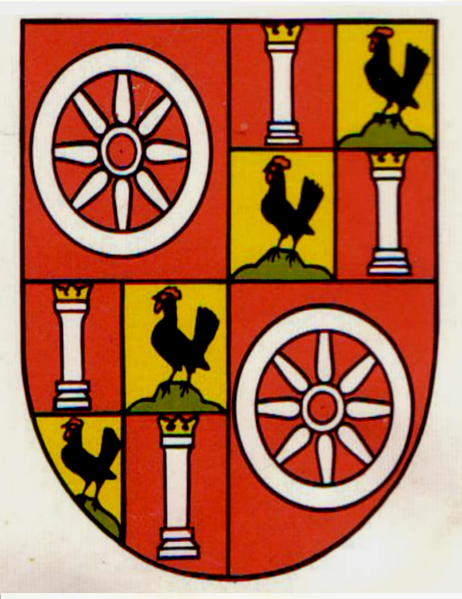 Wappen Berthold von Henneberg Erzbichof von Mainz 1484-1504